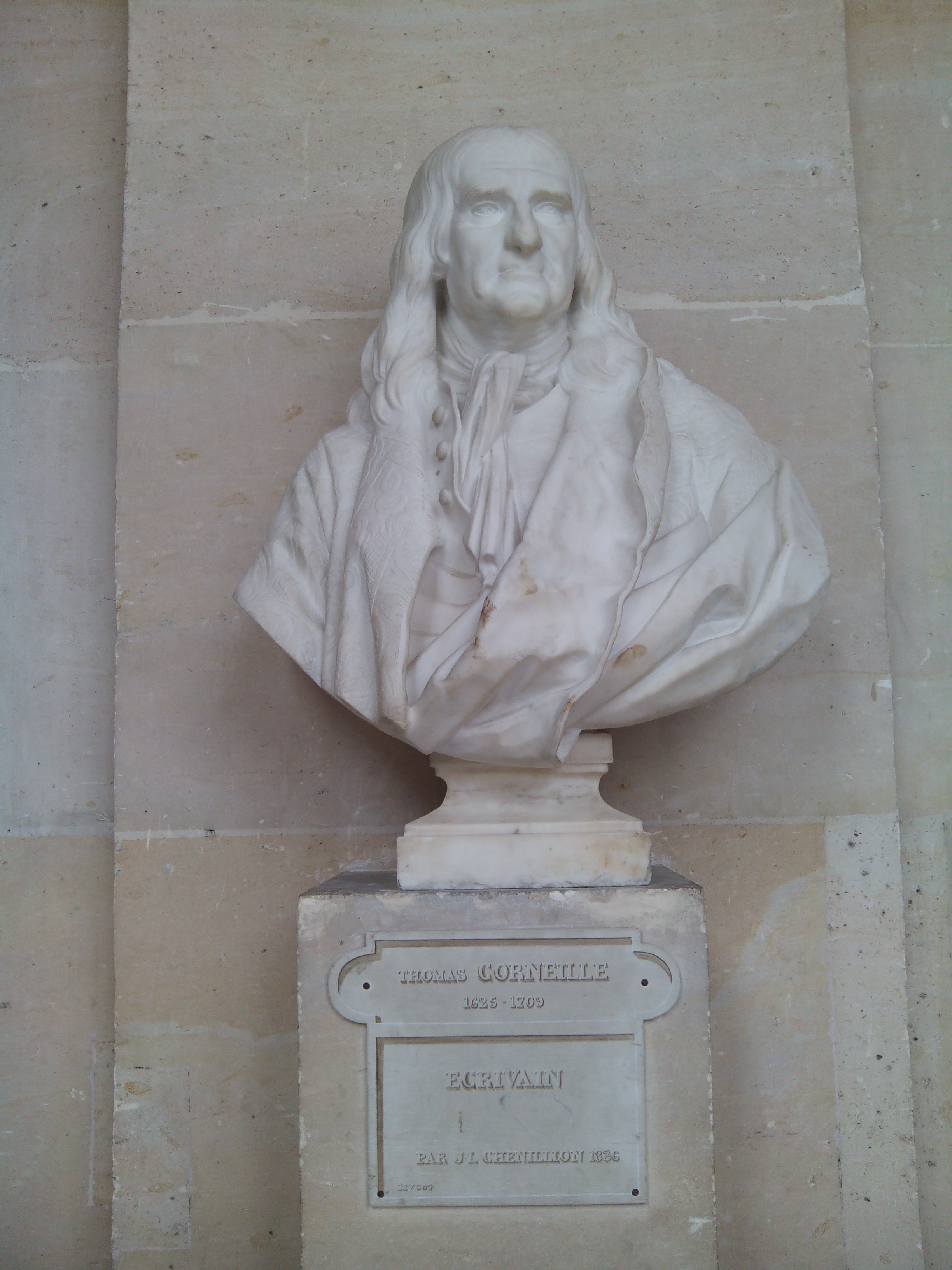 Fotografía realizada en el palacio de Versalles, agosto de 2014